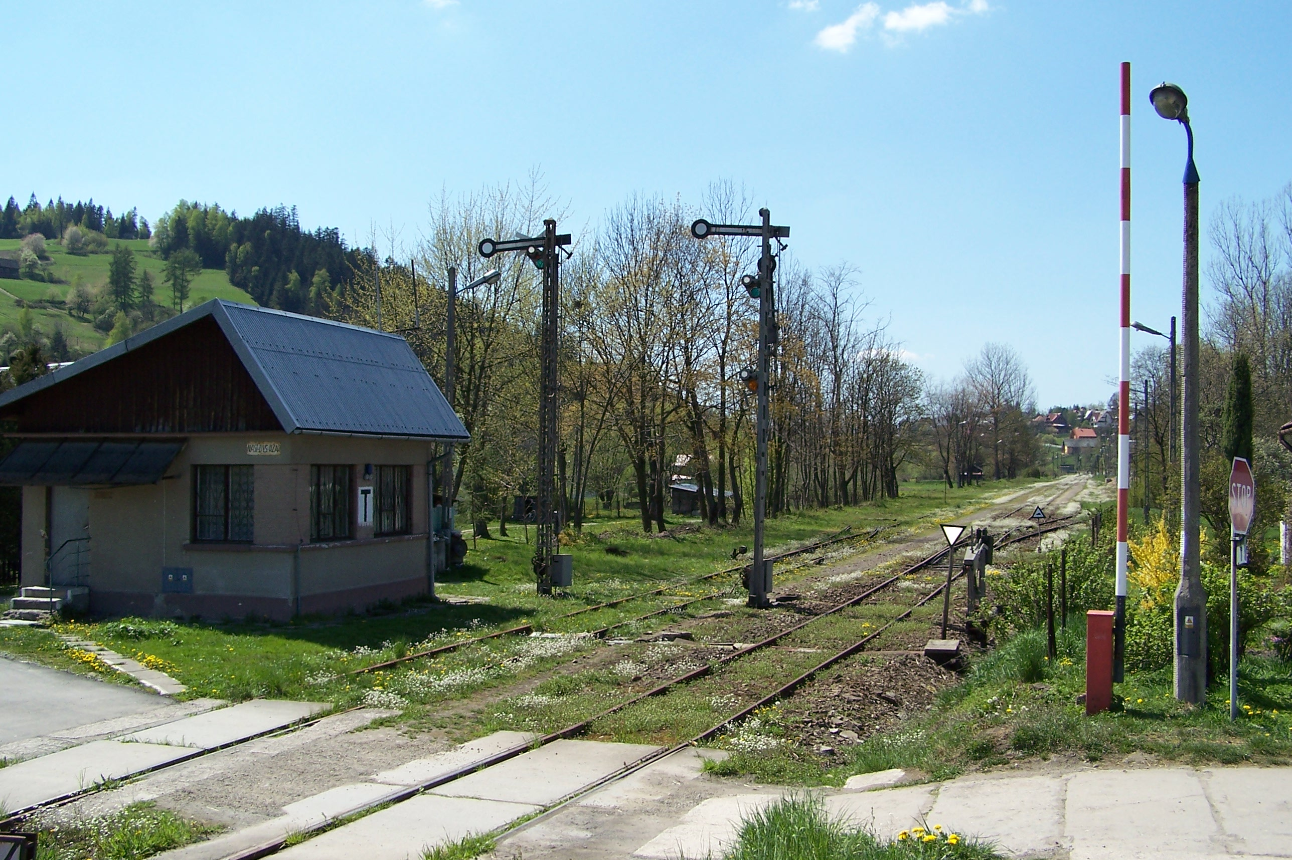 Stacja kolejowa Rabka Zaryte